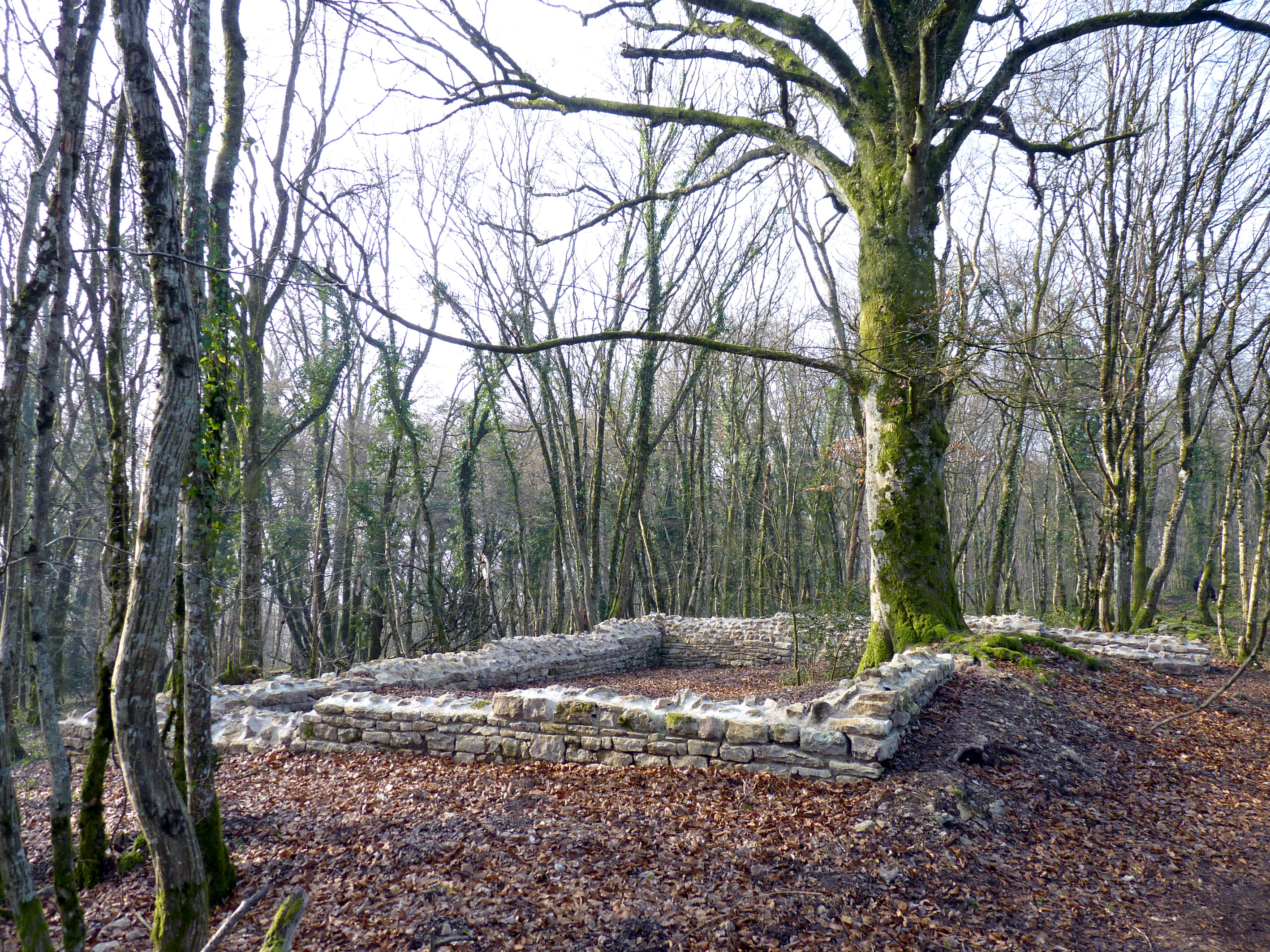 Reconstitution de la base des murs de la Chapelle de Chailluz